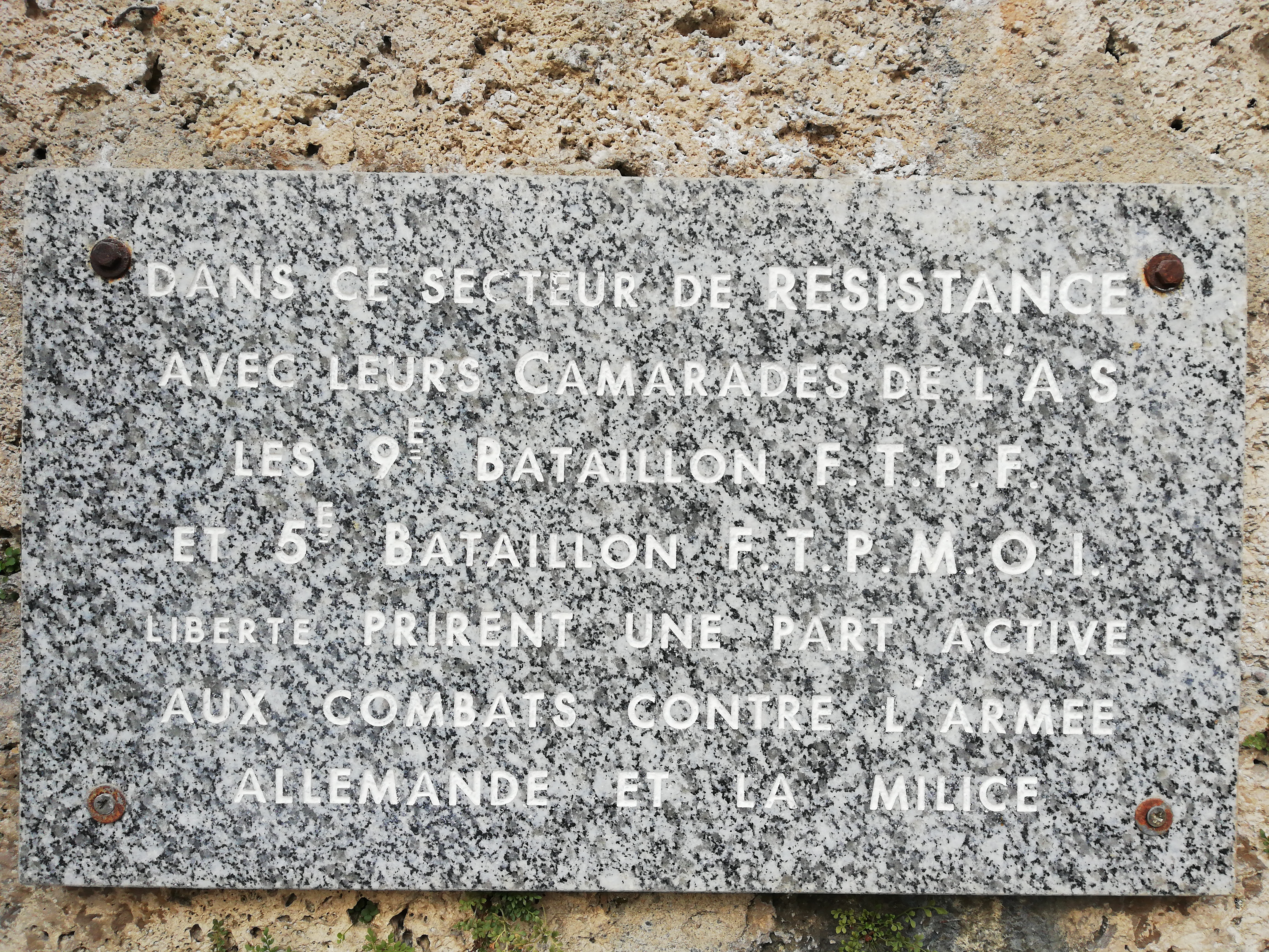 Plaque-mémorial de la Résistance à Uriage (Saint-Martin d'Uriage)